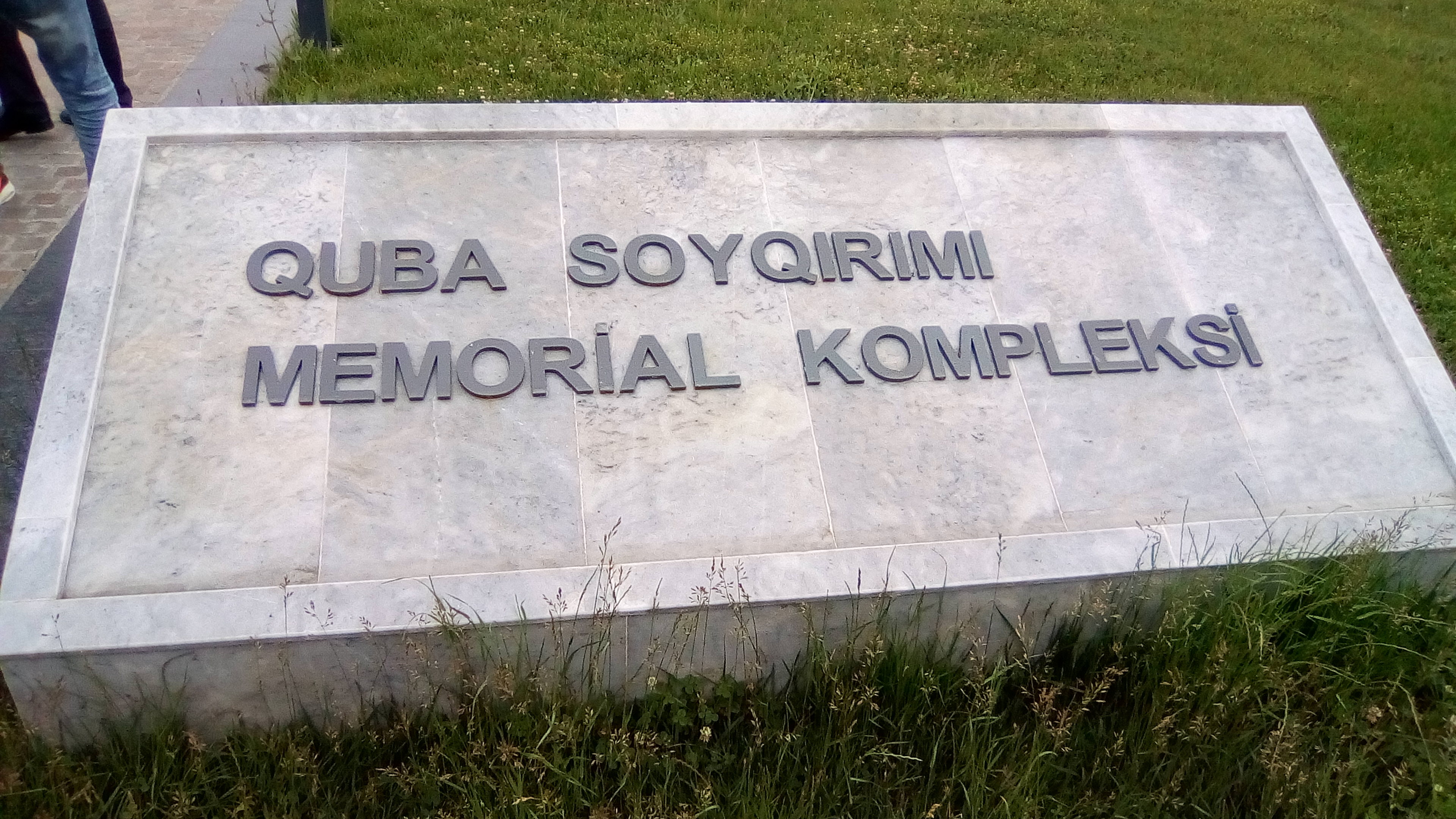 Quba memorial kompleksi